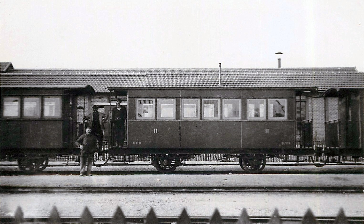 Voiture voyageur en gare de Joigny chemin de fer départemental